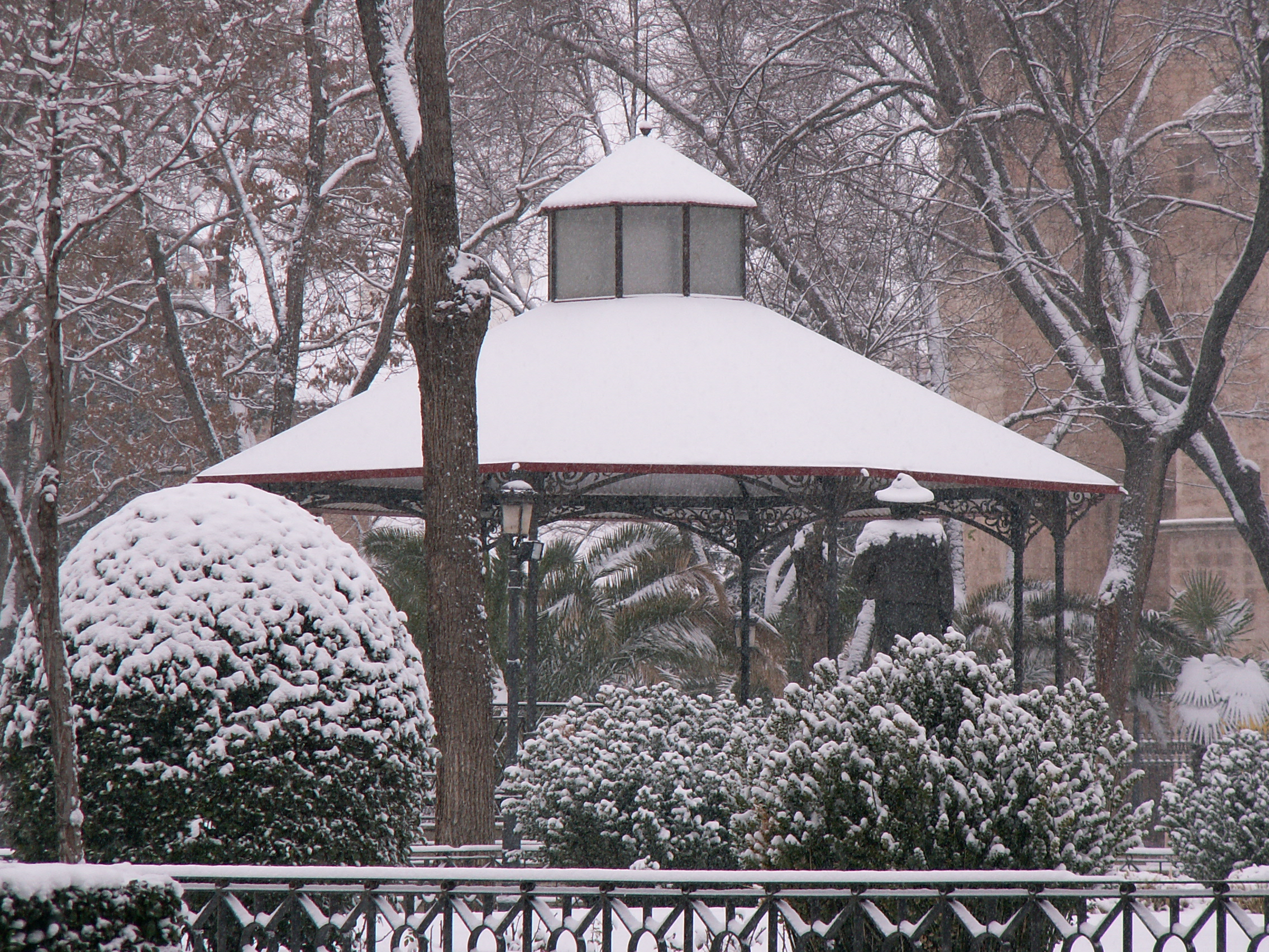 Jardines del Prado de Ciudad Real